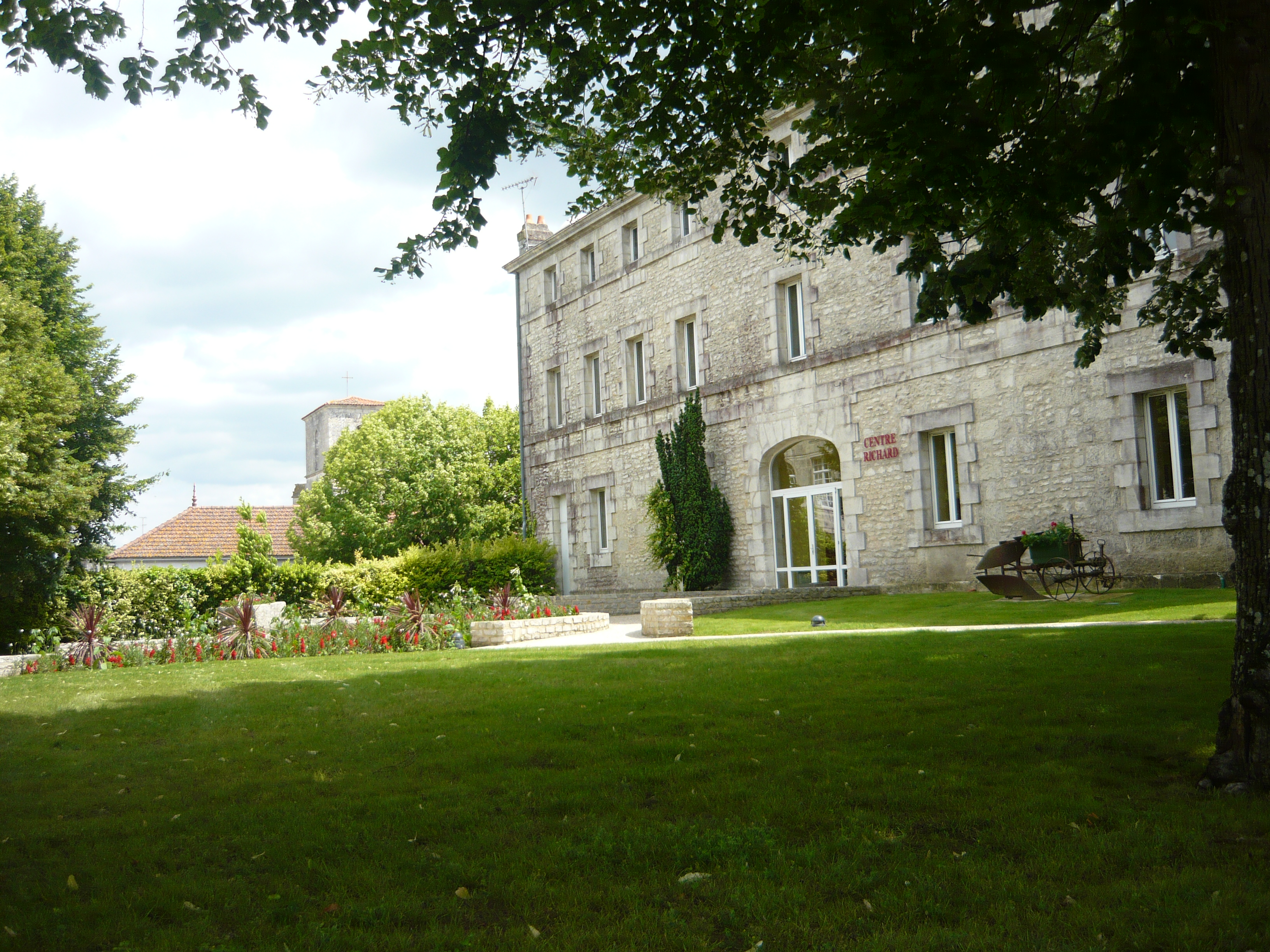 Le parc du Centre Richard de Tonnay-Charente